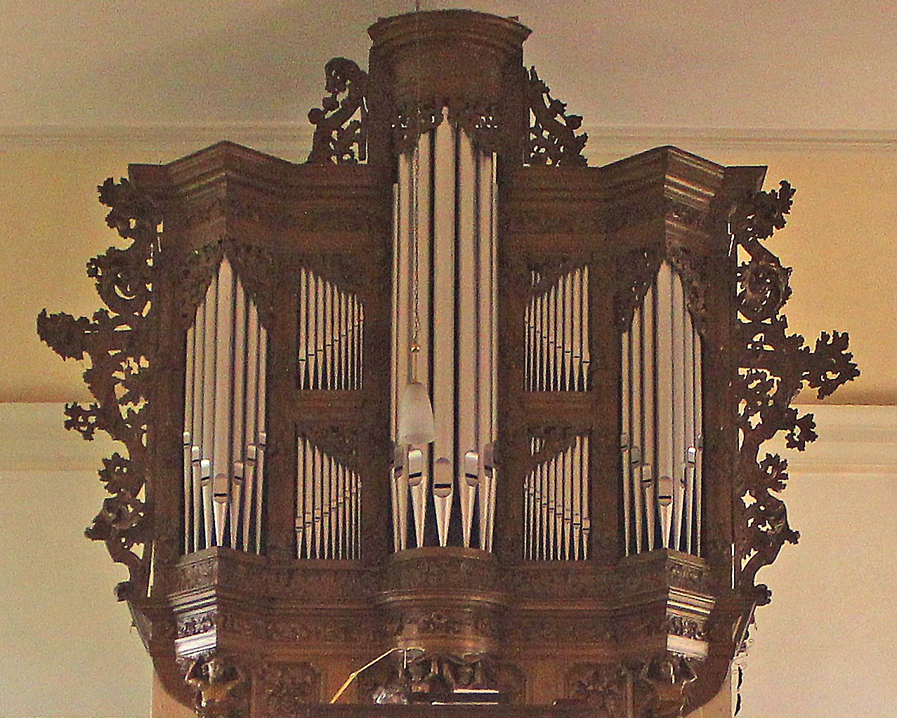 Orgelprospekt der katholischen Pfarrkirche St. Martin in Berus, einem Ortsteil der Gemeinde Überherrn, Landkreis Saarlouis, Saarland